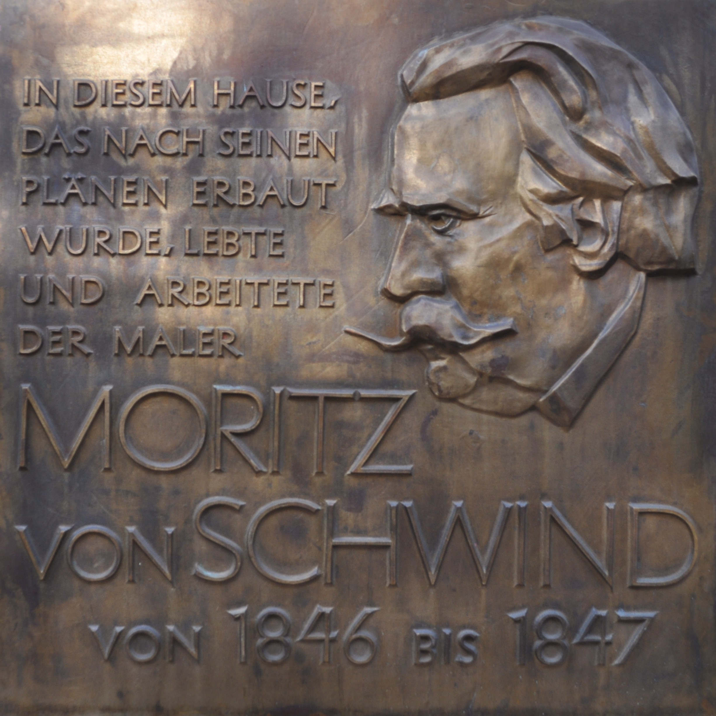 Gedenktafel am Schwindhaus in Frankfurt